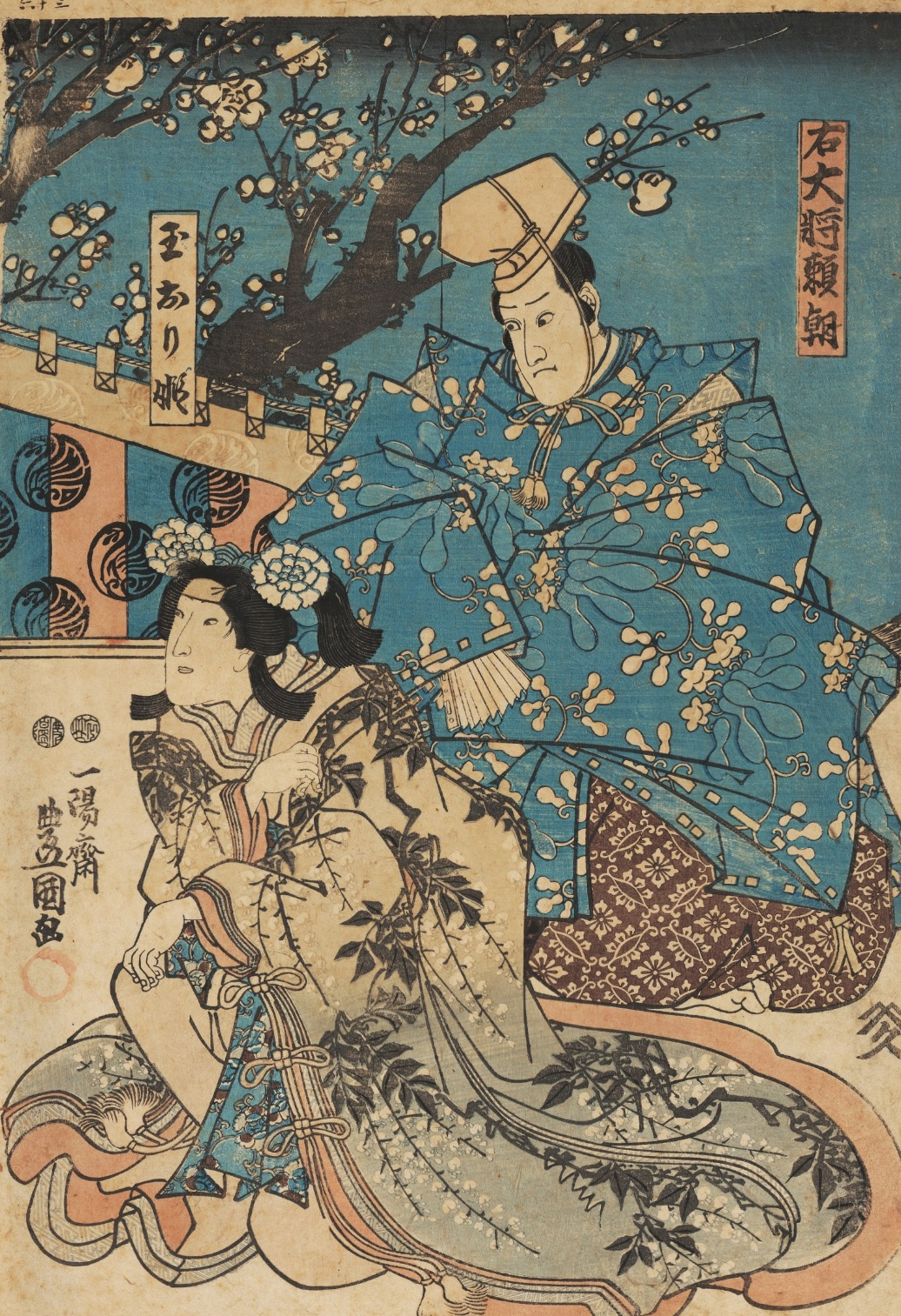 Yadahide? - Século XIX